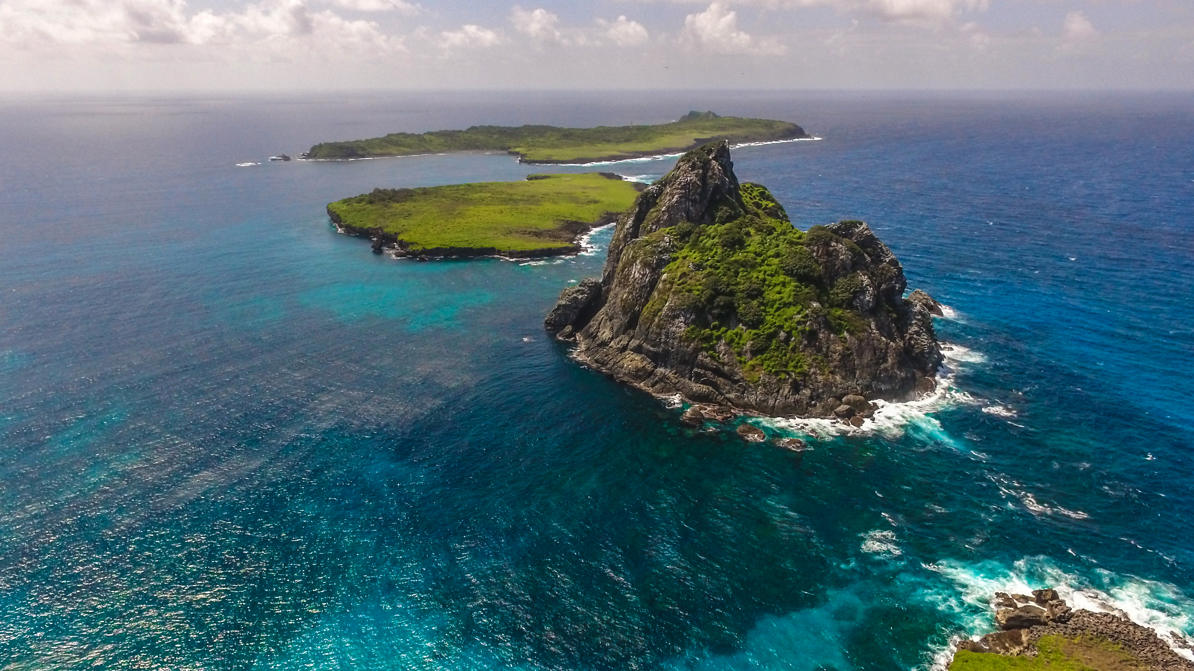 Fernando de Noronha, Pernambuco, Brasil